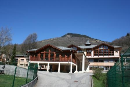 Entrée du collège Le Bonrieu, Bozel (73)